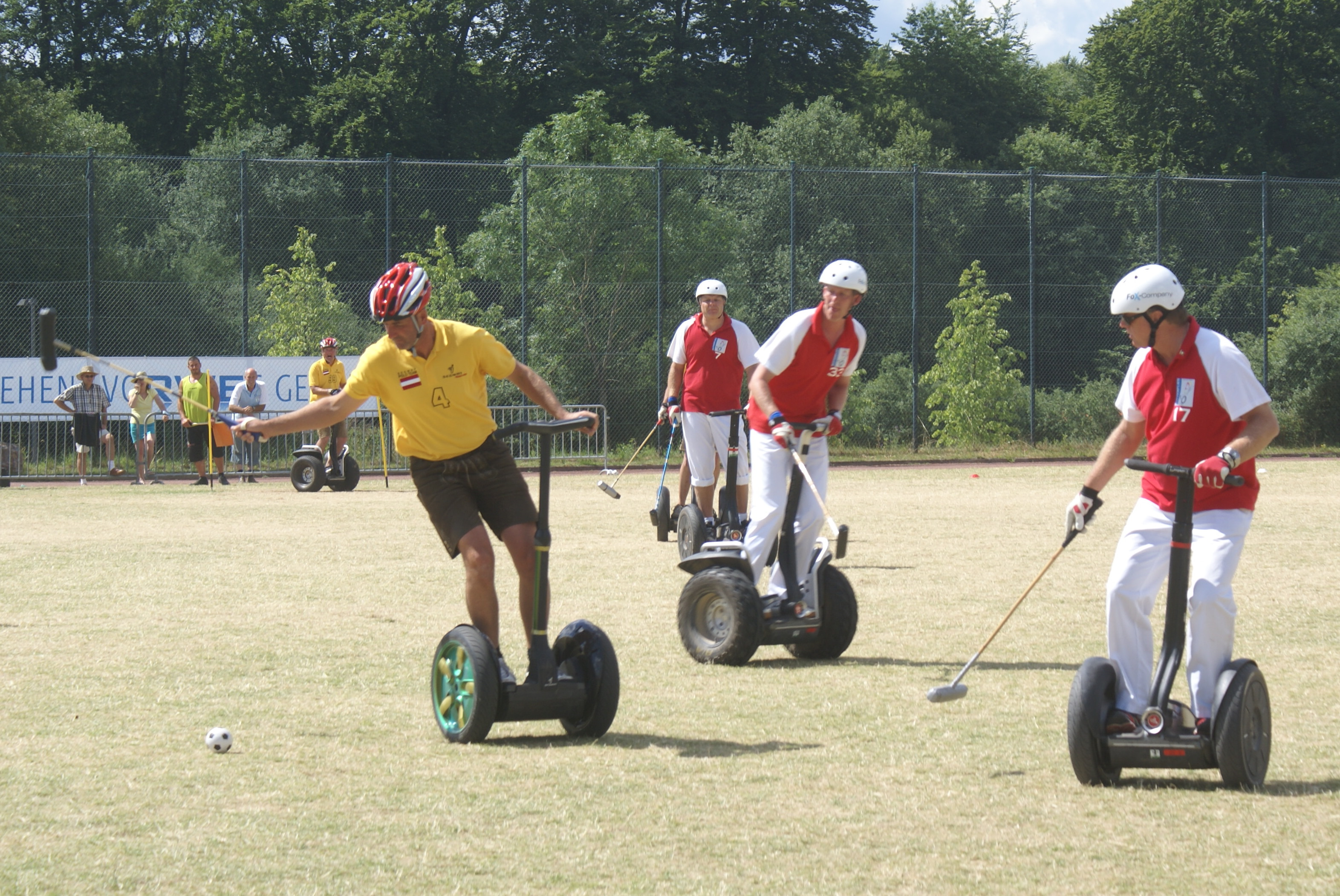 Spiel der ersten offenen Segwaypolo-Europameisterschaft auf der Landesgartenschau Hemer zwischen dem späteren Sieger "Team Austria" und dem Gastgeber "Hemer Butterflies"